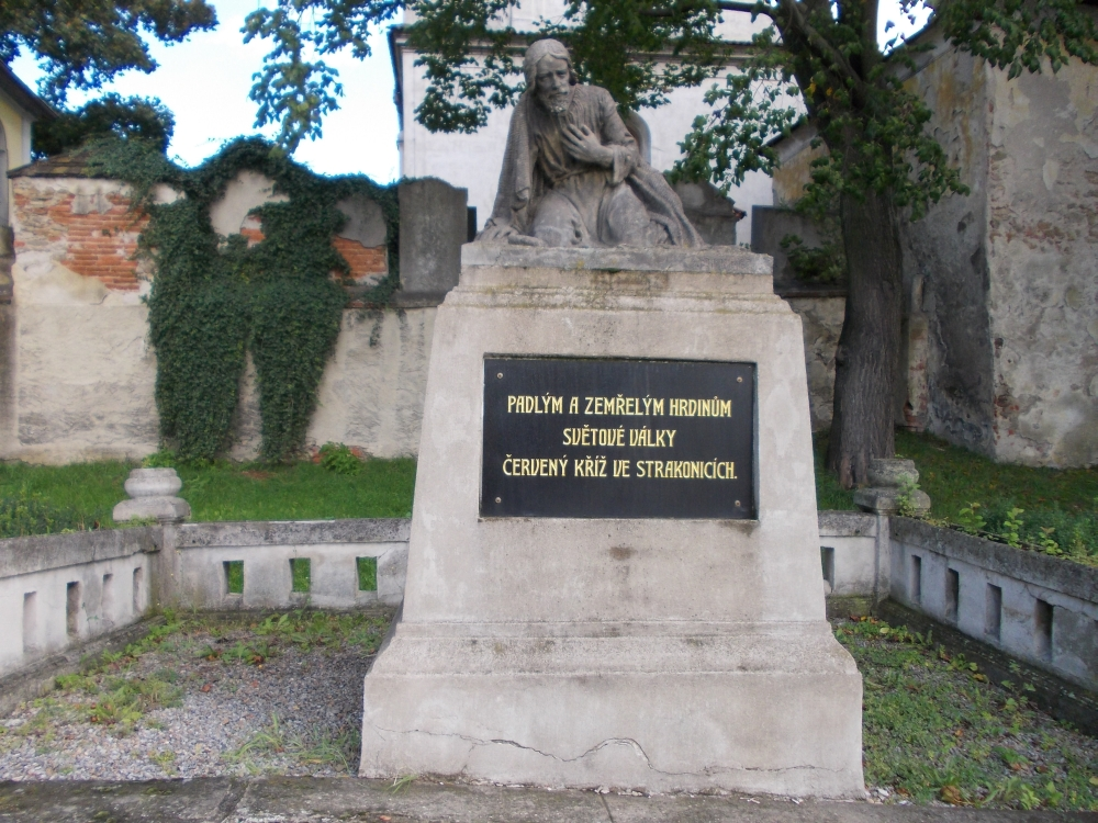 Pomník padlým od Fr. Bílka (Strakonice), na hřbitově u kostela sv. Václava, Strakonice